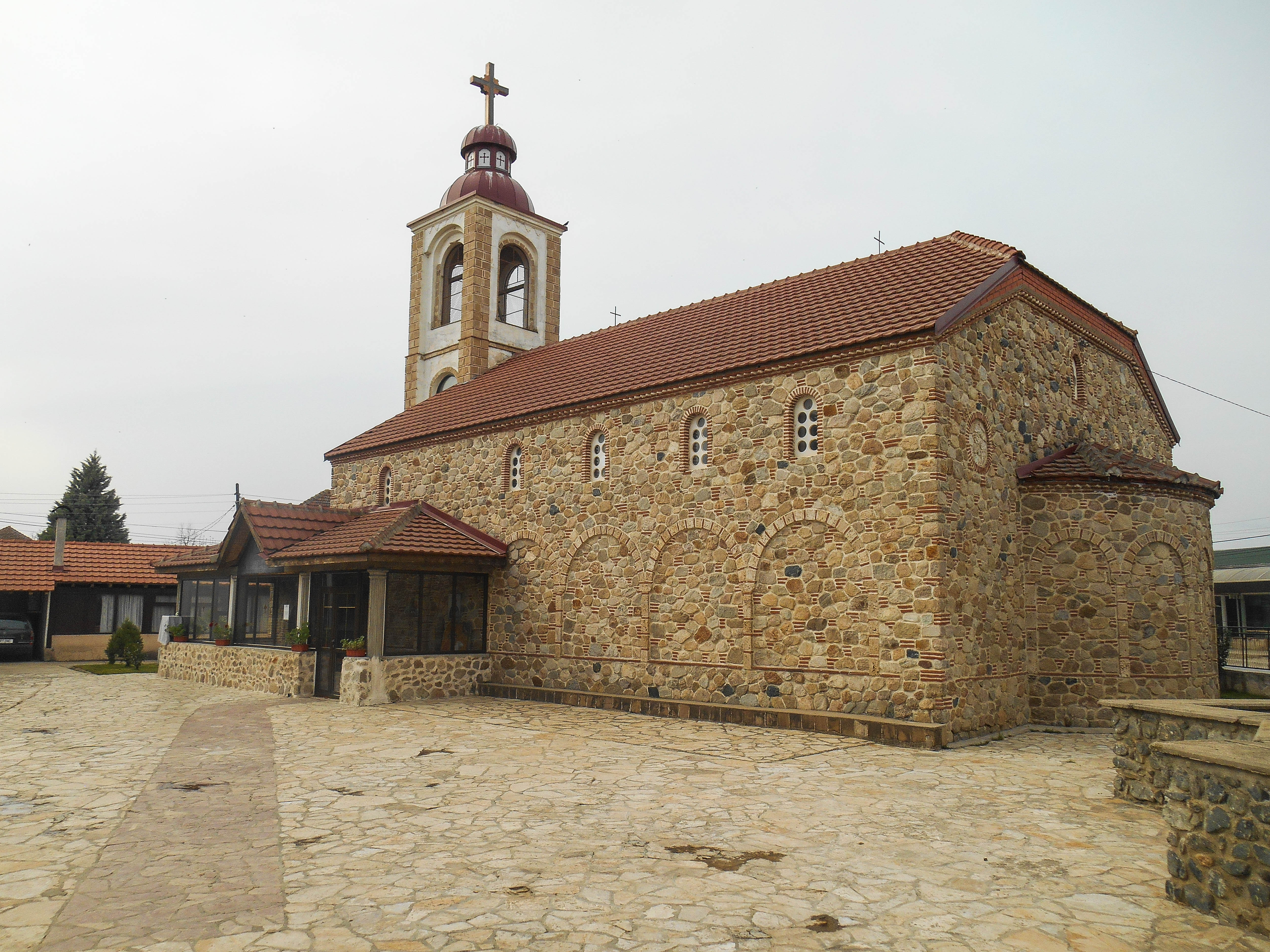 Црквата Св. Ѓорѓи - Муртино